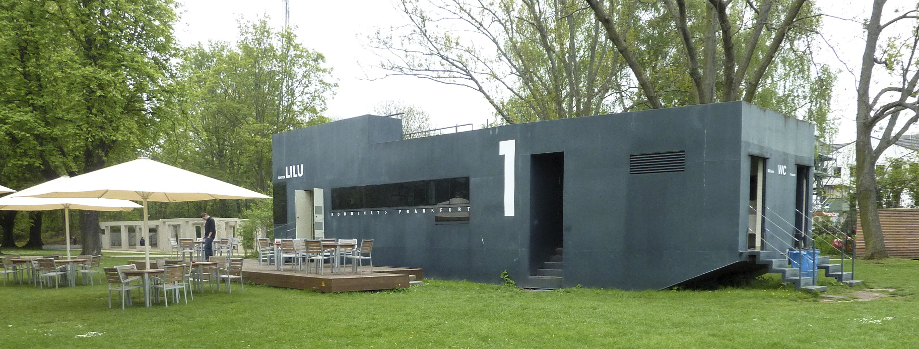 Frankfurt am Main, Stadtteil Niederrad: Das Licht- und Luftbad Niederrad ist eine städtische Grünanlage auf einer schmalen Landzunge am südlichen Mainufer. Das Foto zeigt das in einem hochwassersicheren Ponton eingerichtete Café LILU 1 mit Außenterrasse; Blick nach Südosten